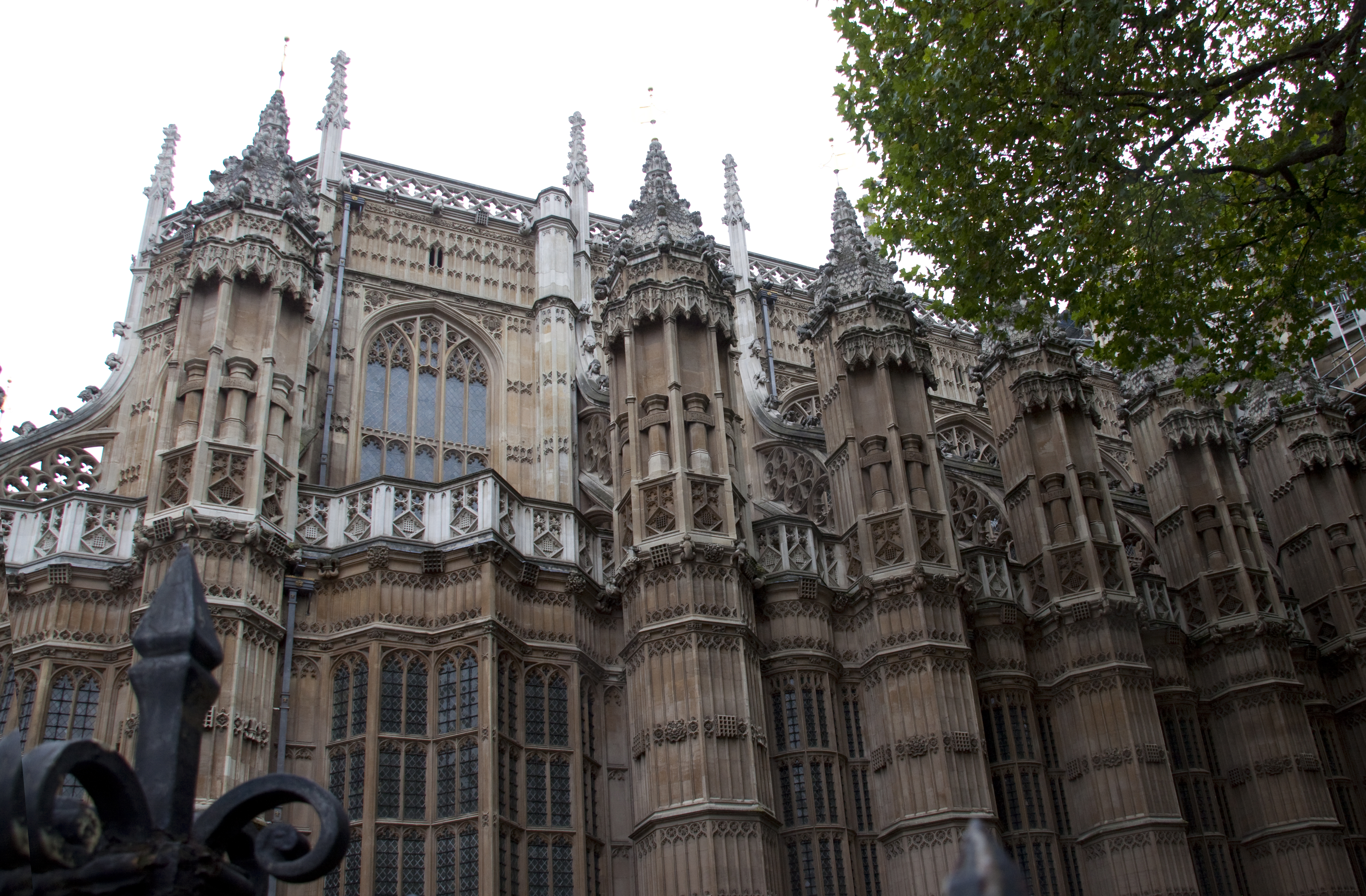 Henry VII Chapel Westminster Abbey